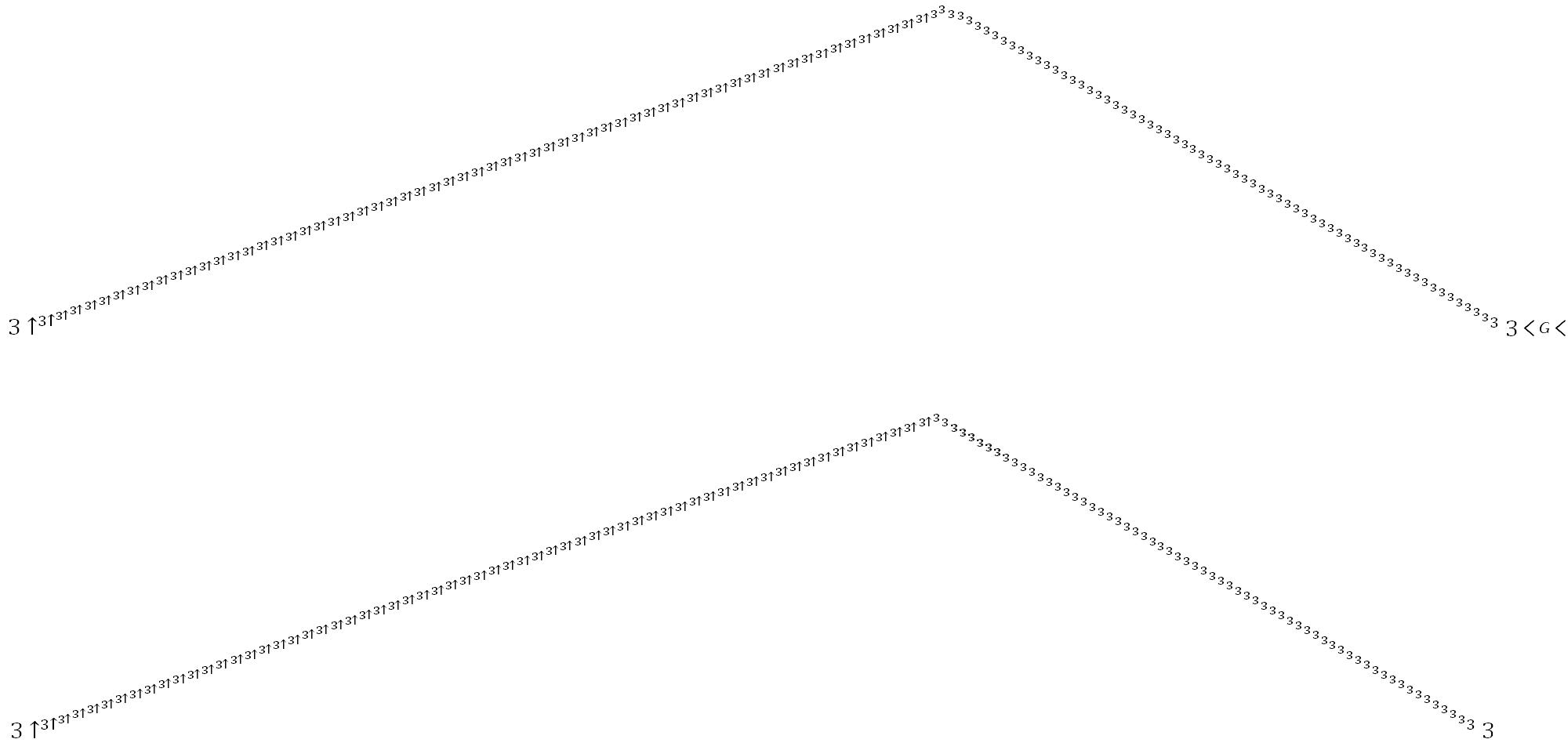 葛立恆數的高德納箭號表示法